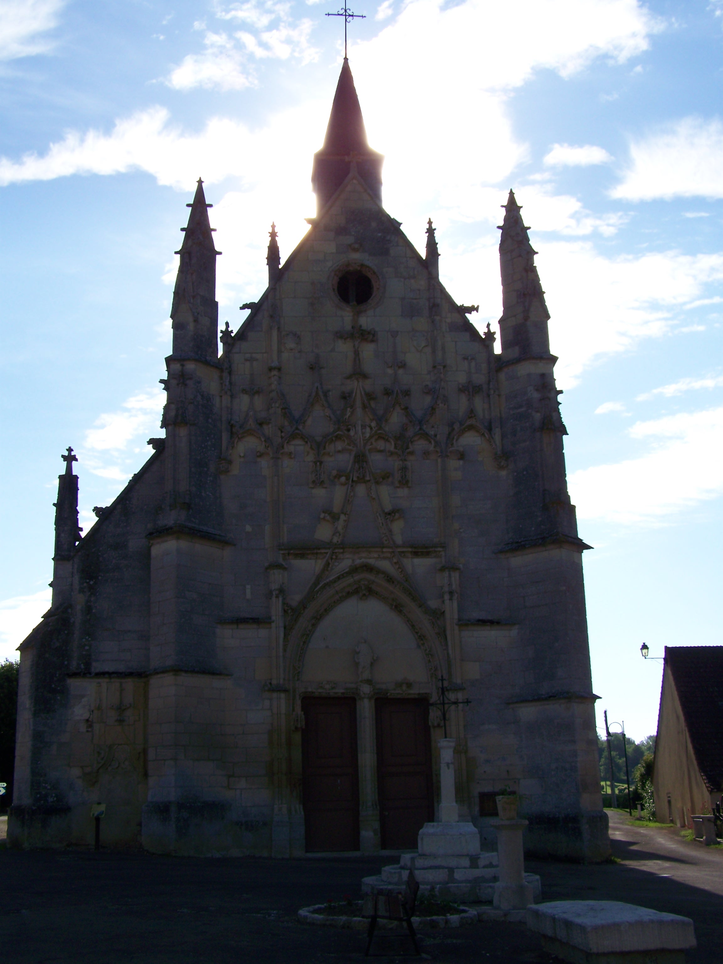 Église de la commune de Saint-Père (Nièvre, Bourgogne, France)